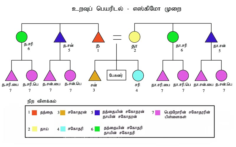 Drawn by the user who uploaded it here.